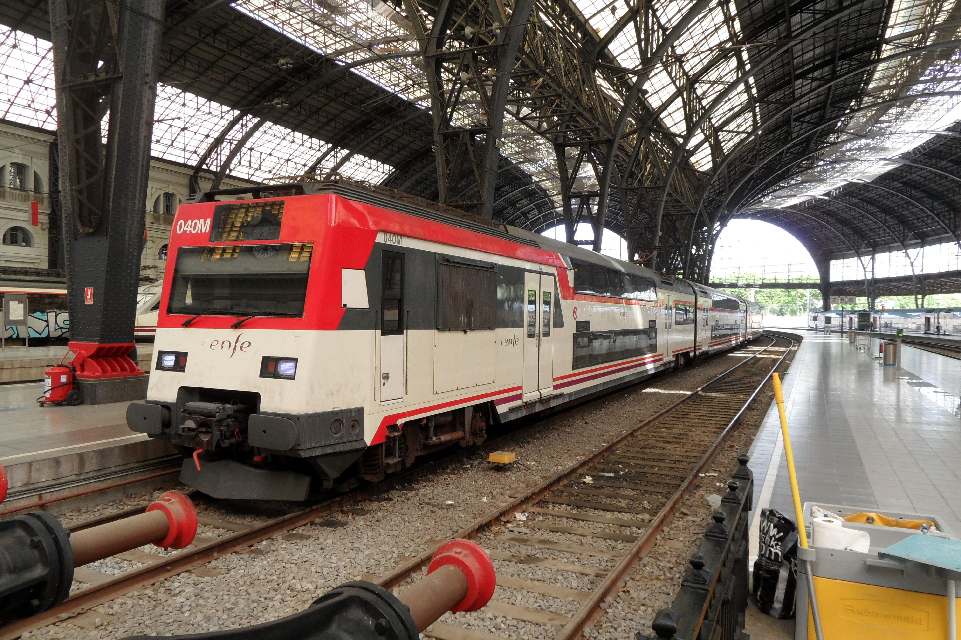 Doppelstocktriebwagen im S-Bahn-Dienst von Barcelona, zum Aufnahmezeitpunkt verkehren die Doppelstockwagen auch in Katalonien noch im zweiten, landeseinheitlichen Anstich.